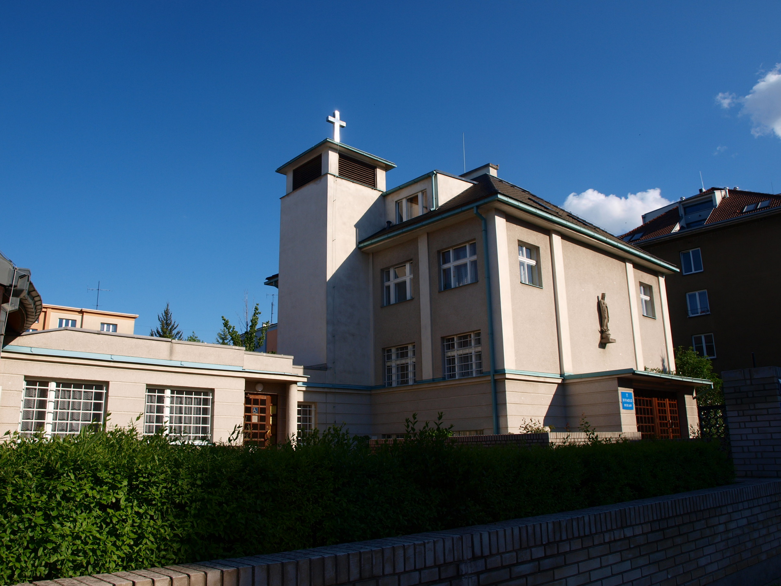 Divadlo Miriam při kostele Neposkvrněného početí Panny Marie ve Strašnicích